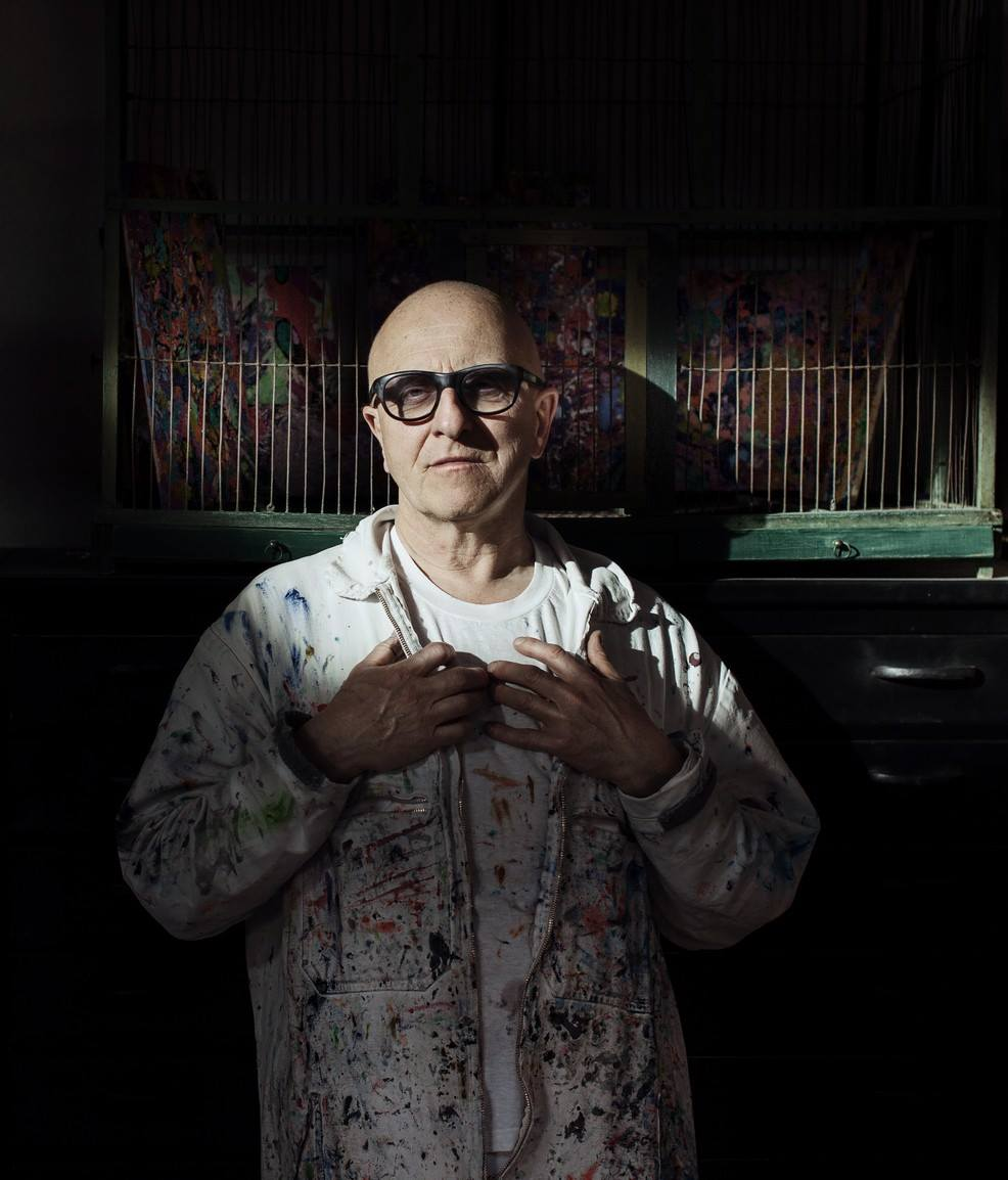 Kjell Erik Killi Olsen, photo by David Mignérat, 2015